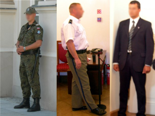 Funkcjonariusze Biura Ochrony Rządu